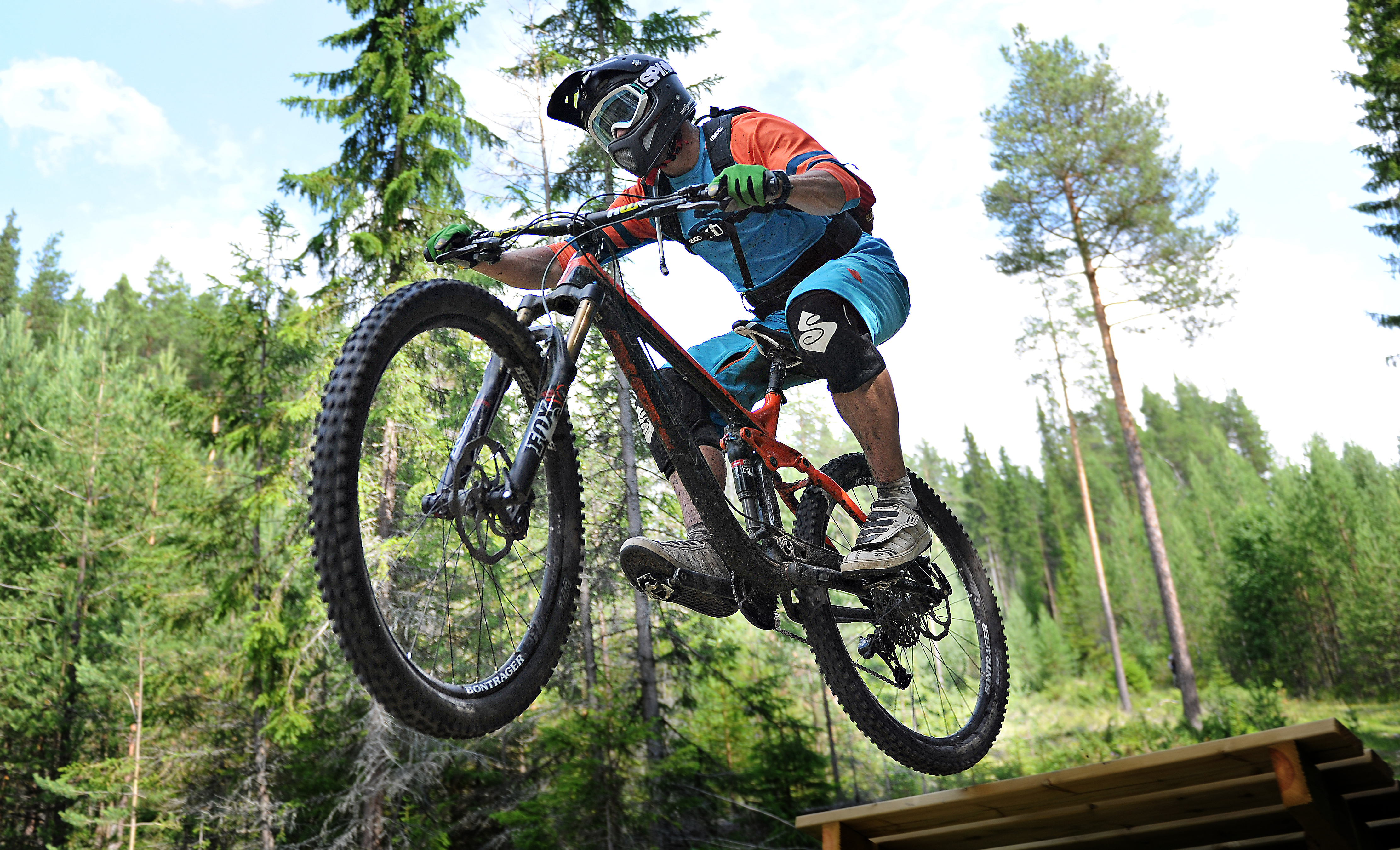 Foto: Ivar Thoresen